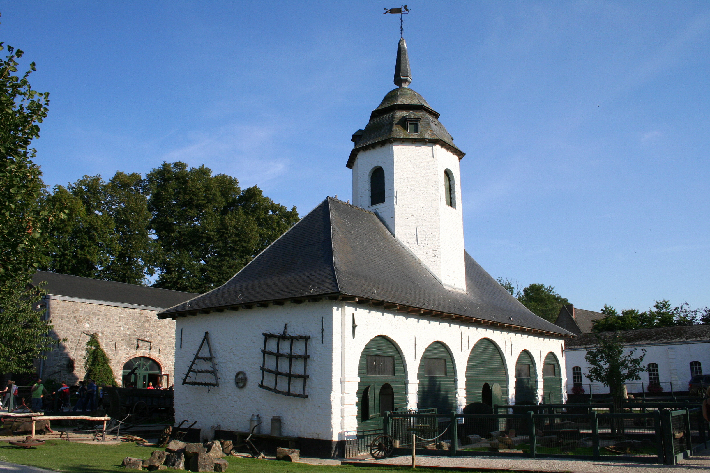 Cambron-Casteau, tour-colombier de l'ancienne ferme abbatiale.